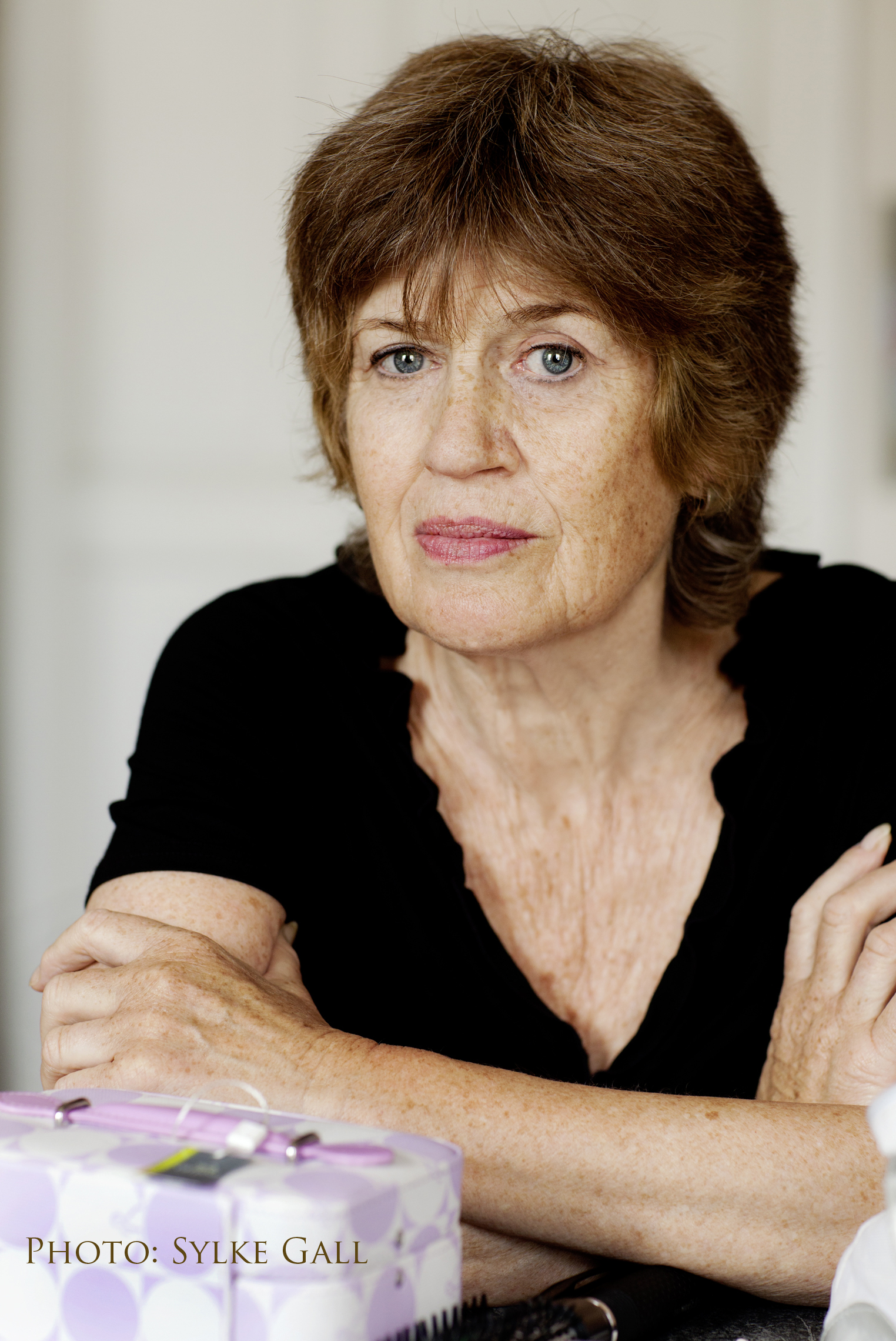 Portrait von Monica Gruber